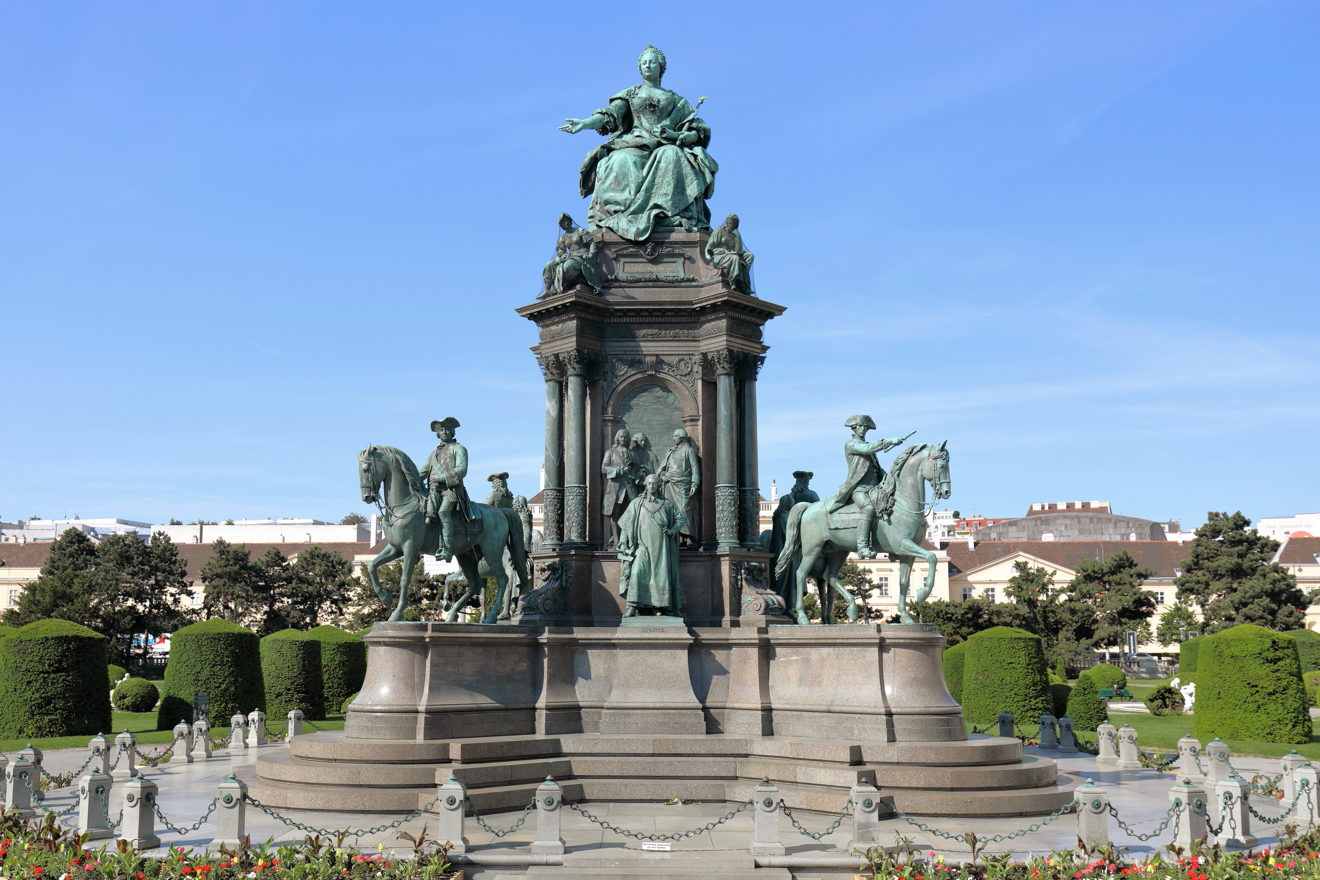 Das Maria-Theresien-Denkmal am Maria-Theresien-Platz im 1. Wiener Gemeindebezirk Innere Stadt.Das imposanteste Werk der neueren plastischen Kunst in Wien wurde in 13 Jahren (Modell 1874, Vollendung 1887) von Caspar von Zumbusch (Plastiken) und Carl von Hasenauer (Bauwerk) geschaffen und am 13. Mai 1888, dem Geburtstag der Herrscherin, enthüllt. Auf den 4 Flügeln des Unterbaus befinden sich die Reiterstandbilder der Feldherren Gideon Ernst Freiherr von Loudon, Leopold Graf Daun, Ludwig Andreas Graf Khevenhüller und Otto Ferdinand Graf Abensberg-Traun. Die 4 Seiten des mittleren Aufbaus behandeln jeweils eine Thematik (Berater der Kaiserin, Verwaltung, Militär sowie Wissenschaft und Kunst. Wobei jeweils eine frei stehende Figur dargestellt ist (Berater: Wenzel Anton Dominik Graf Kaunitz; Verwaltung: Staatskanzler Friedrich Wilhelm Graf Haugwitz, Schöpfer der Verwaltungsreform; Militär: Joseph Wenzel Fürst Liechtenstein, Reorganisator des Geschützwesens; Wissenschaft und Kunst: Leibarzt Gerard van Swieten, Reformator der Universität) und 16 Figuren vor den Hochreliefs in den 4 Bogenfeldern.